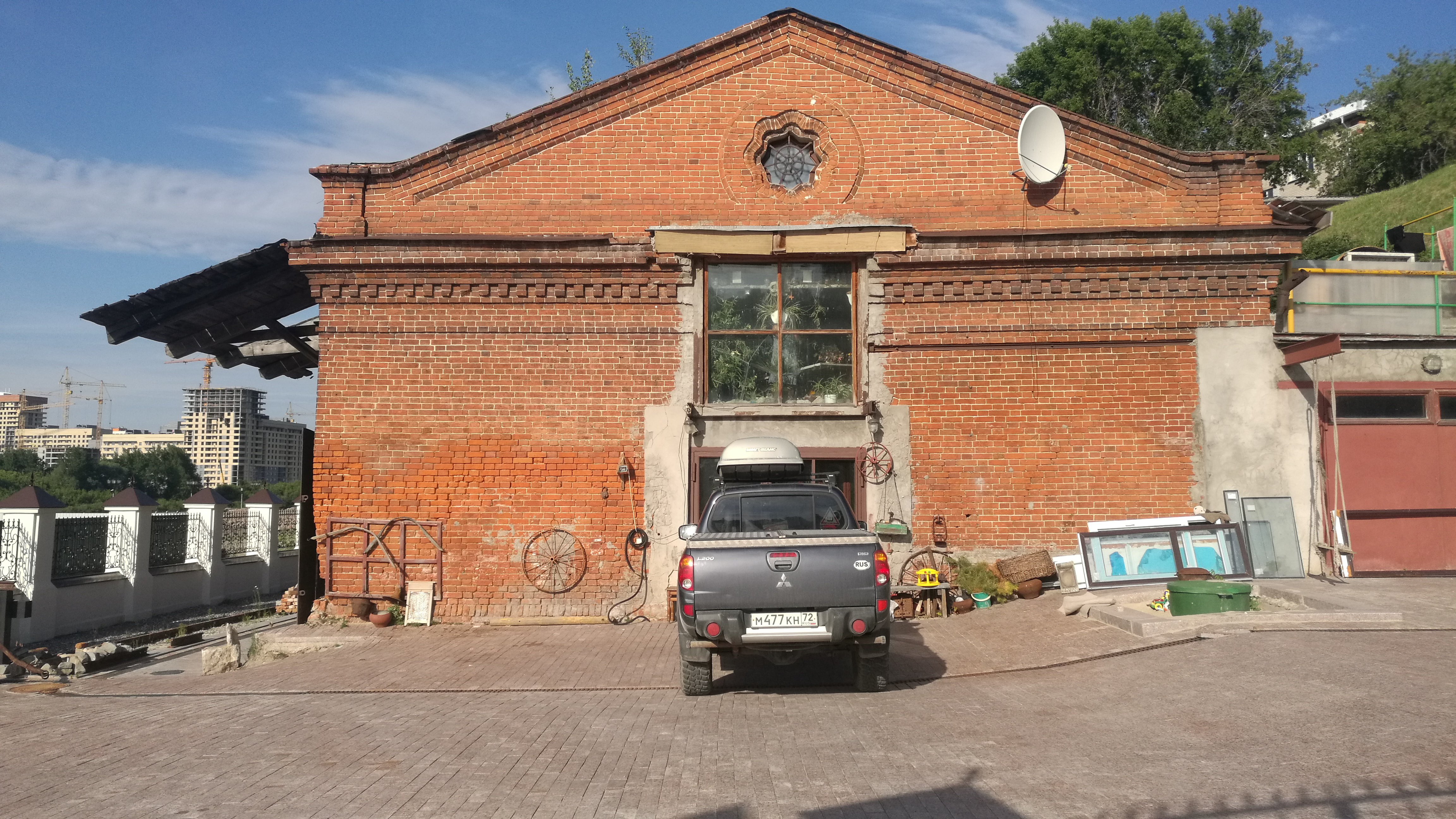 Malnova domo ĉe la kajo de rivero Turo. Tjumeno, Rusio.